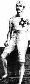 Laurence Myers, athlète américain né le 16 février 1858 et mort le 15 février 1899) , spécialiste de nombreuses disciplines (du 50 yd au mile)